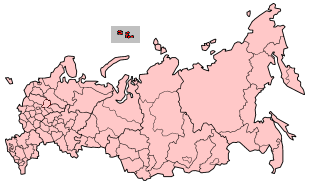 Polo?aj oto?ja Zemlja Franje Josipa u odnosu na Rusiju. Kartu sam sam izradio na osnovi karata Rusije koje mogu biti prona?ene na engleskoj Wikipediji.